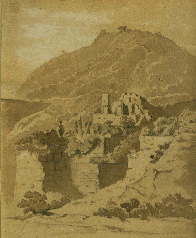 Hinterburg bei Neckarsteinach, Lavierte Zeichnung in Sepia mit Weißhöhung